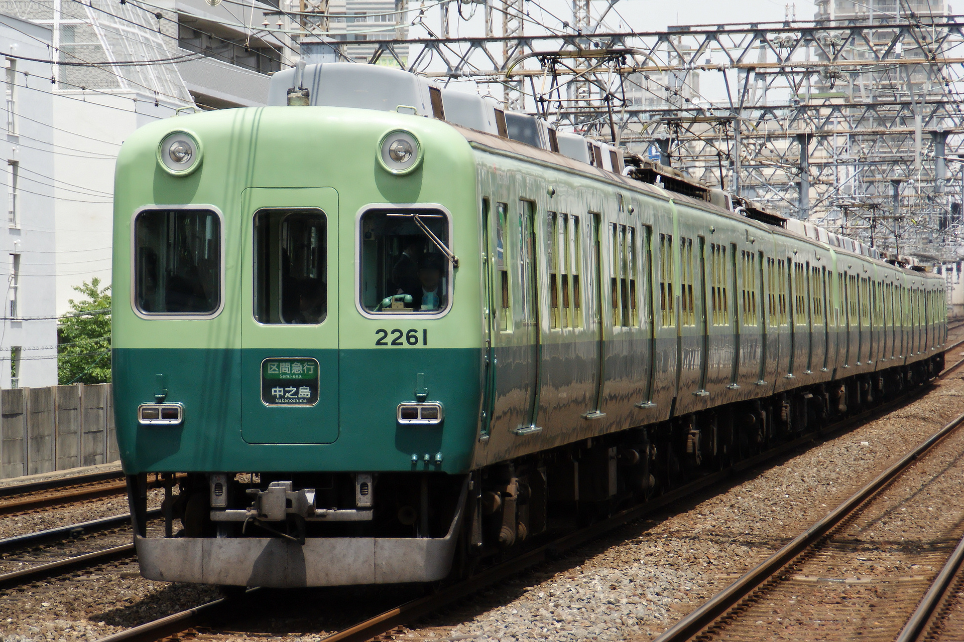 旧塗装の京阪2200系（2011年5月13日、京阪本線・土居）